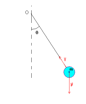 Image de physique Schéma Pendule simple